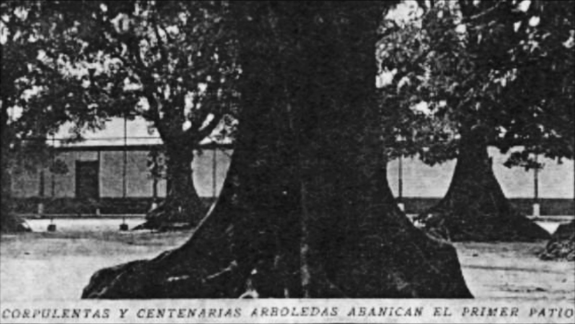 Arboles centenarios en el patio central del Instituto Belen.